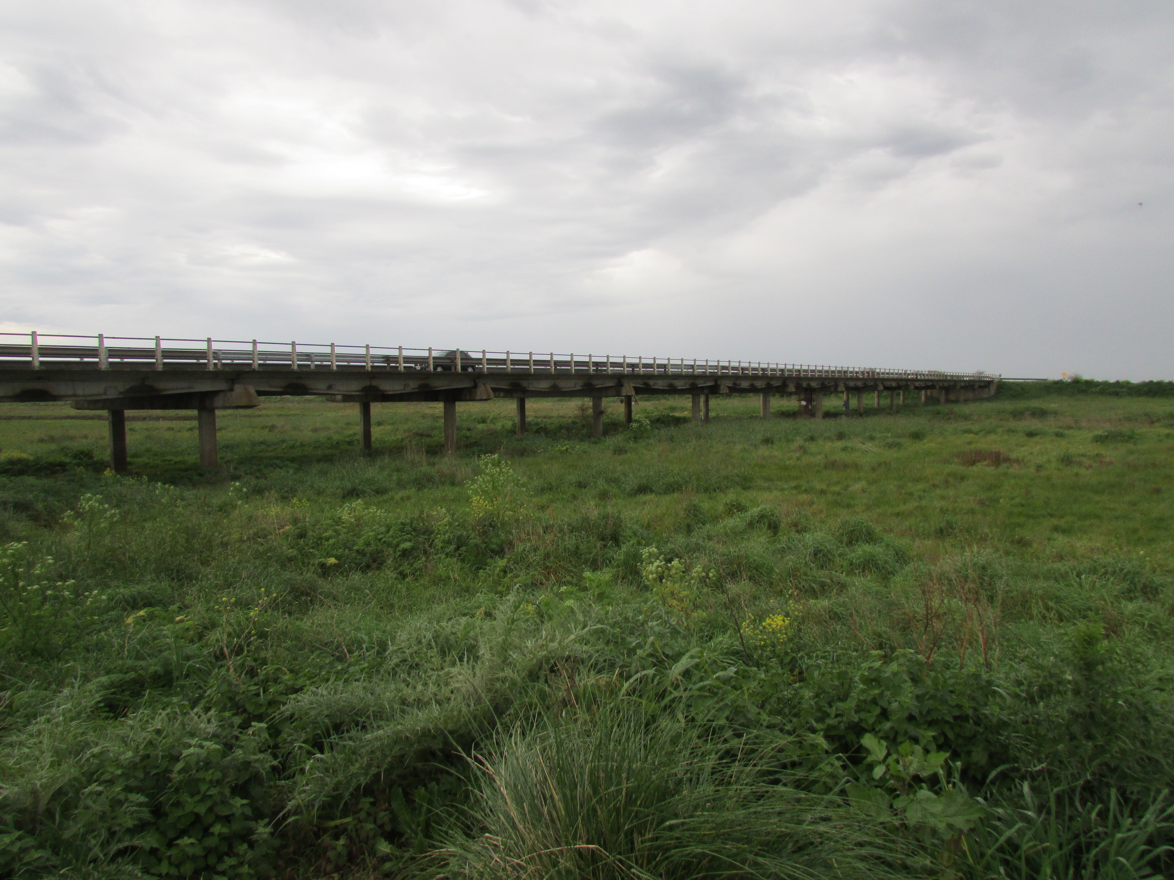 Puente de la ruta provincial 56 sobre el Canal 2 en la zona rural del partido de General Lavalle, provincia de Buenos Aires, Argentina.